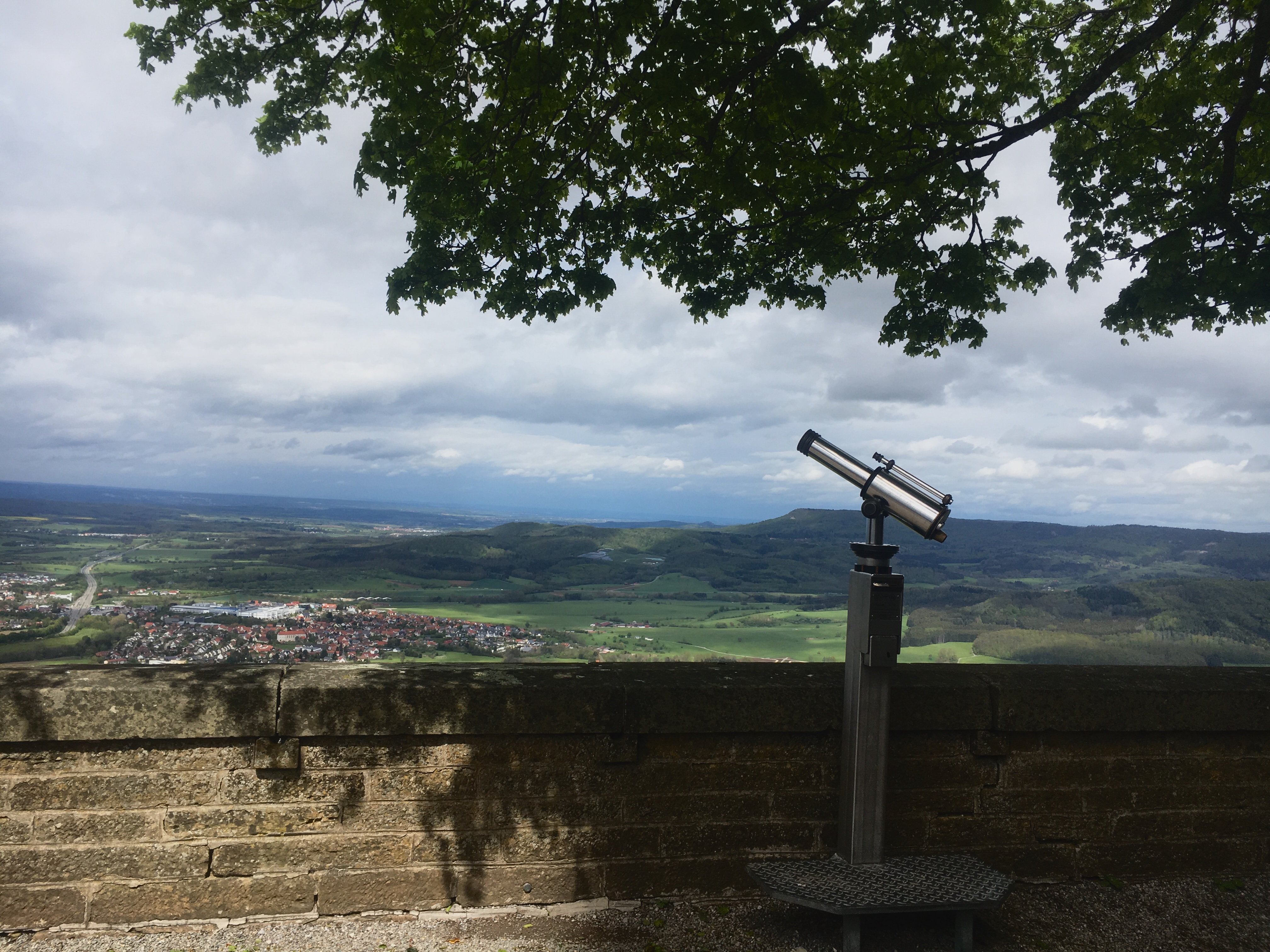 Вид со смотровой площадки Замка Гогенцоллерн в Баден-вюртенберге, Германия